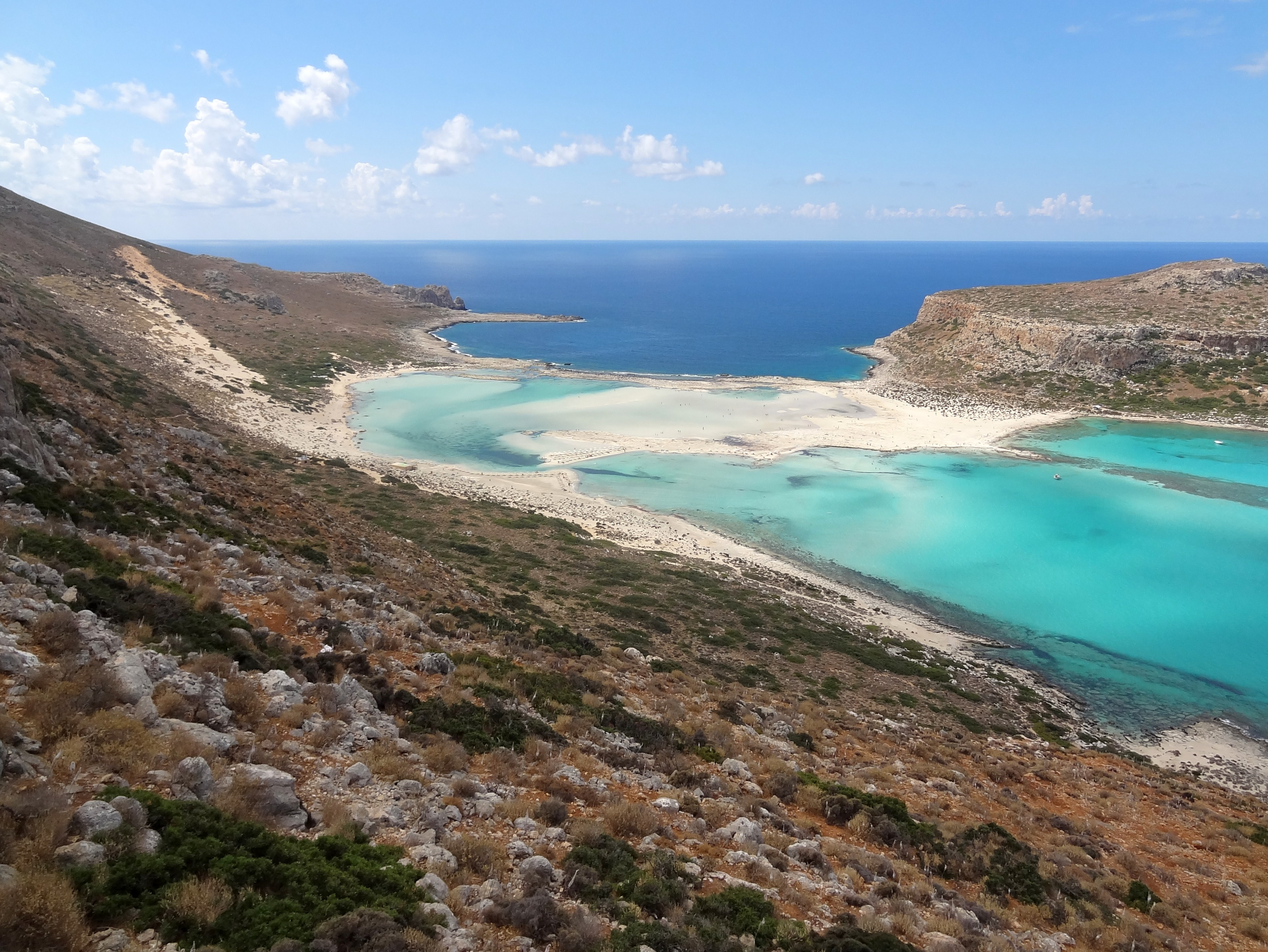 Strand von Balos (Μπάλος) auf der Halbinsel Gramvousa, Gemeinde Kissamos, Regionalbezirk Chania, Kreta, Griechenland